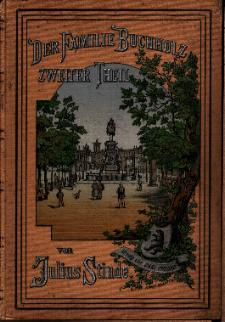 Umschlagillustration Familie Buchholz, Teil 2 Das Buch befindet sich in meinem Besitz. Stinde ist 1905 gestorben, seine Werke sind gemeinfrei. Das Umschlagbild, vermutlich von A. Horn, Leipzig, ist ebenfalls gemeinfrei. Den Umschlag habe ich eingescannt und stelle der Wikipedia das Bild als Spende zur Verfügung. Goerdten